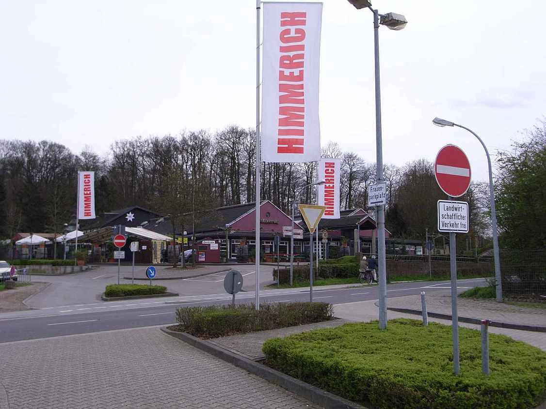 Diskothek „Haus Waldesruh“ Himmerich (Heinsberg, NRW)